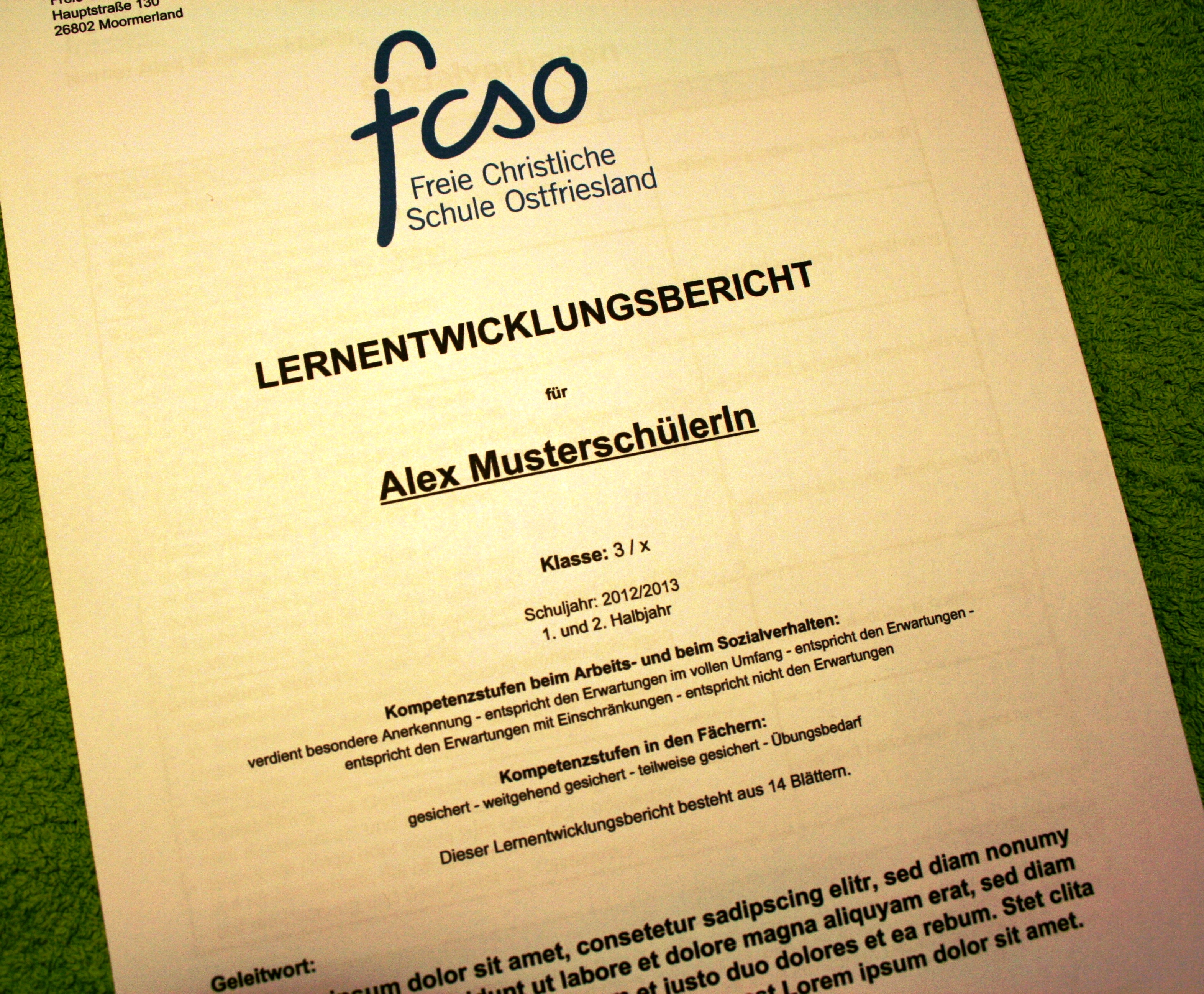 Deckblatt eines Lernentwicklungsberichts für den 3. Schuljahrgang an der FCSO